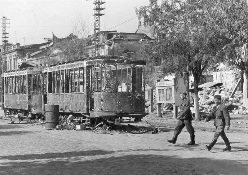 „Miasto Mikołajów po zajęciu przez wojska niemieckie. Widoczne zniszczone budynki oraz tramwaj.”